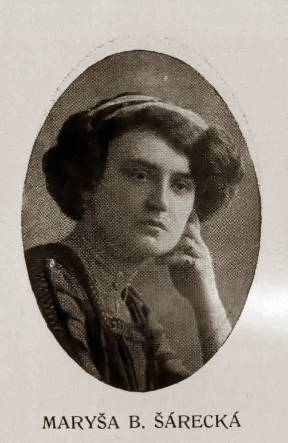 Maryša Šárecká (1890 - 1958), Česká spisovatelka.